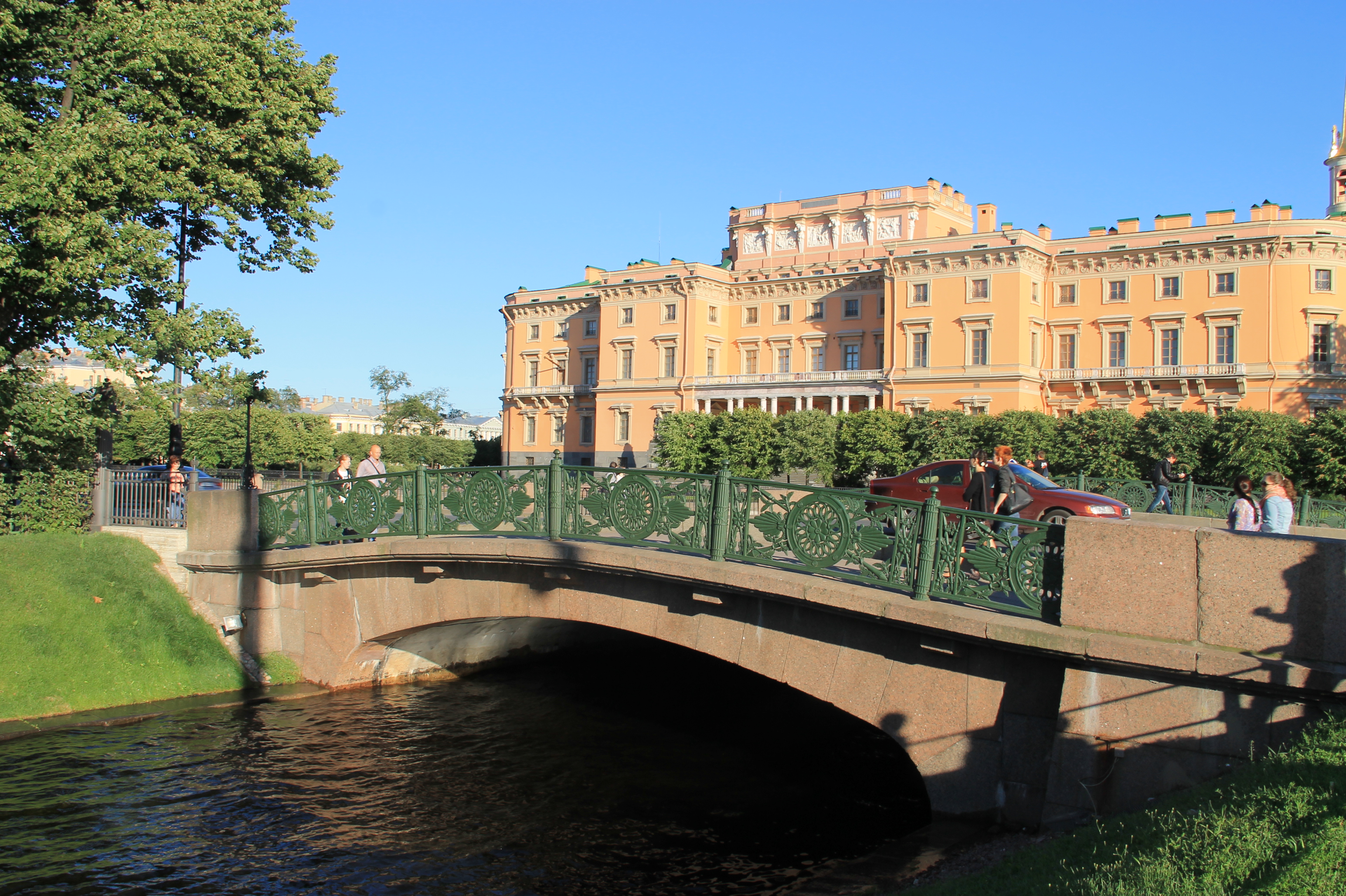 Нижний Лебяжий мост через Лебяжью канавку, Санкт-Петербург.